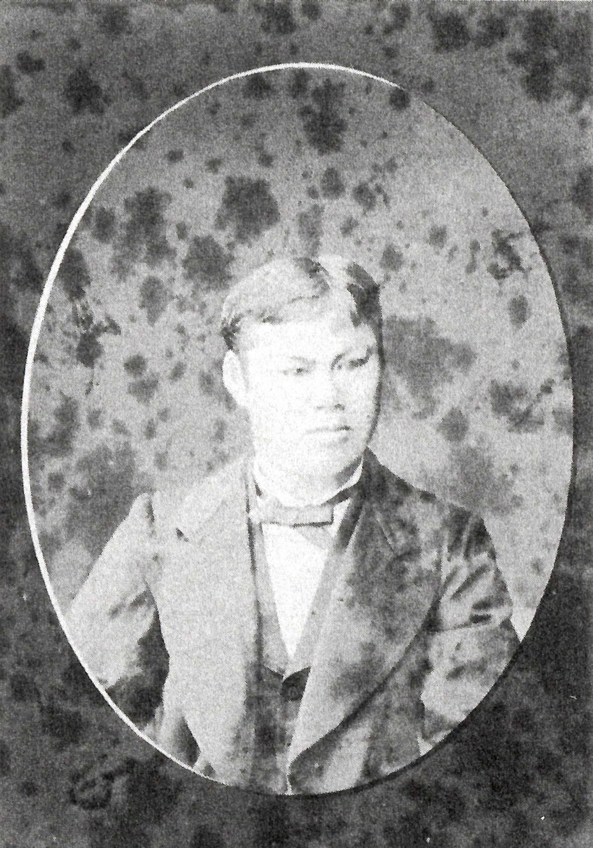 堀田正頌の肖像写真。